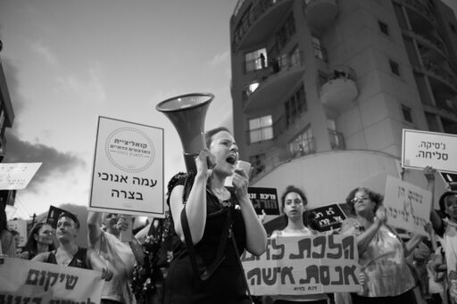 תמונת מפגינות בעצרת הזכרון לג'סיקה וקרבנות הזנות משנת 2018, התמונה צולמה בירקון 98